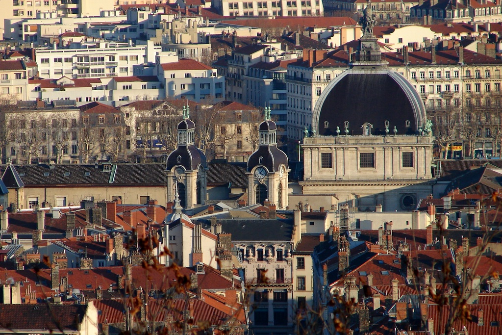 Hôter-Dieu de Lyon, vu de la colline de Fourvière. Au centre, la chapelle ; à droite, le grand dôme.